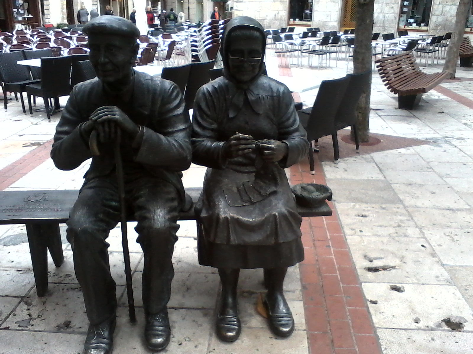 Escultura que representa a una pareja de viejecitos sentada en el Centro histórico de Burgos